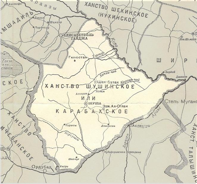 Azerbaijani khanate of Karabakh in the map of Caucasus in 1809-1817 years (Карта военных действий в Закавказском крае с 1809 по 1817 год)